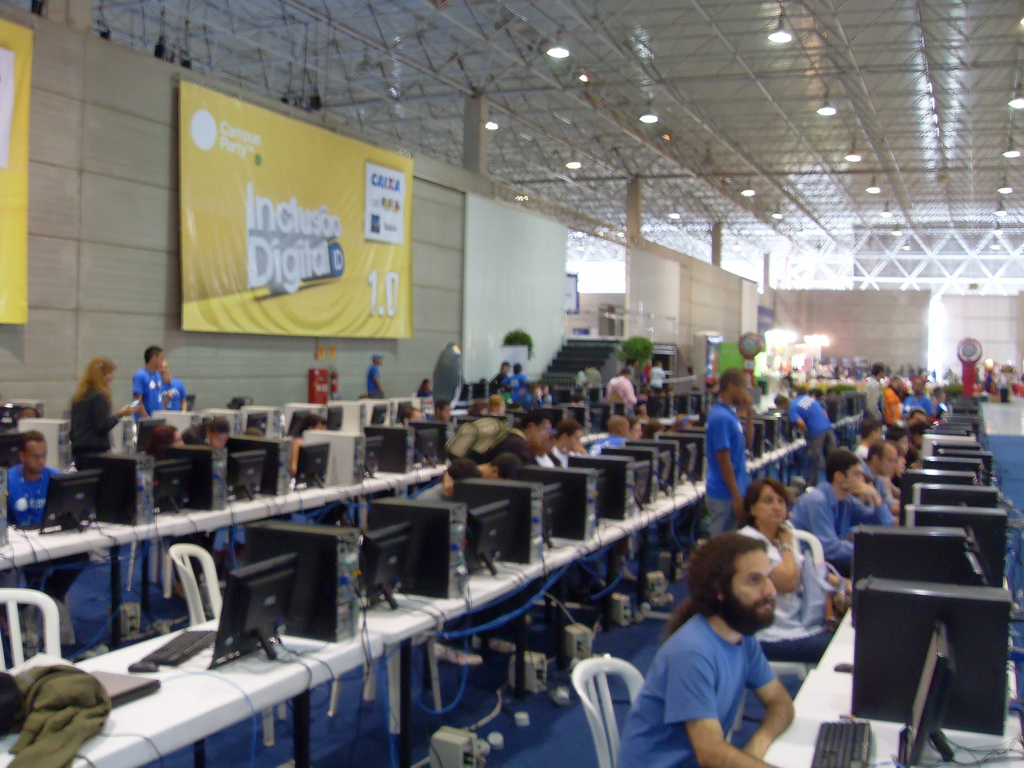 Oficina na Campus Party sobre uso da Wikipédia, quinta-feira.